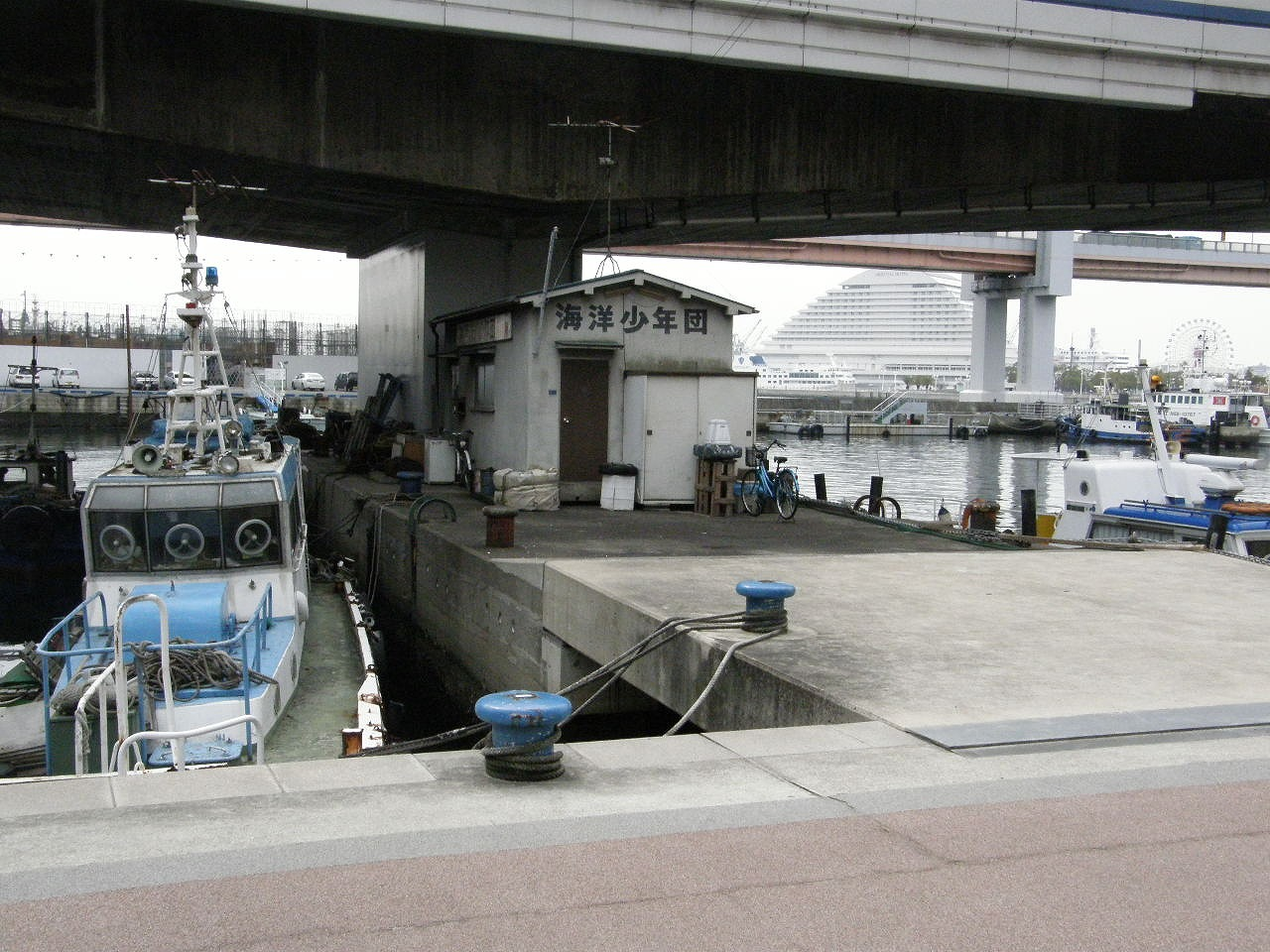 神戸海洋少年団 ー第５管区海上保安本部の橋ー神戸市中央区波止場町